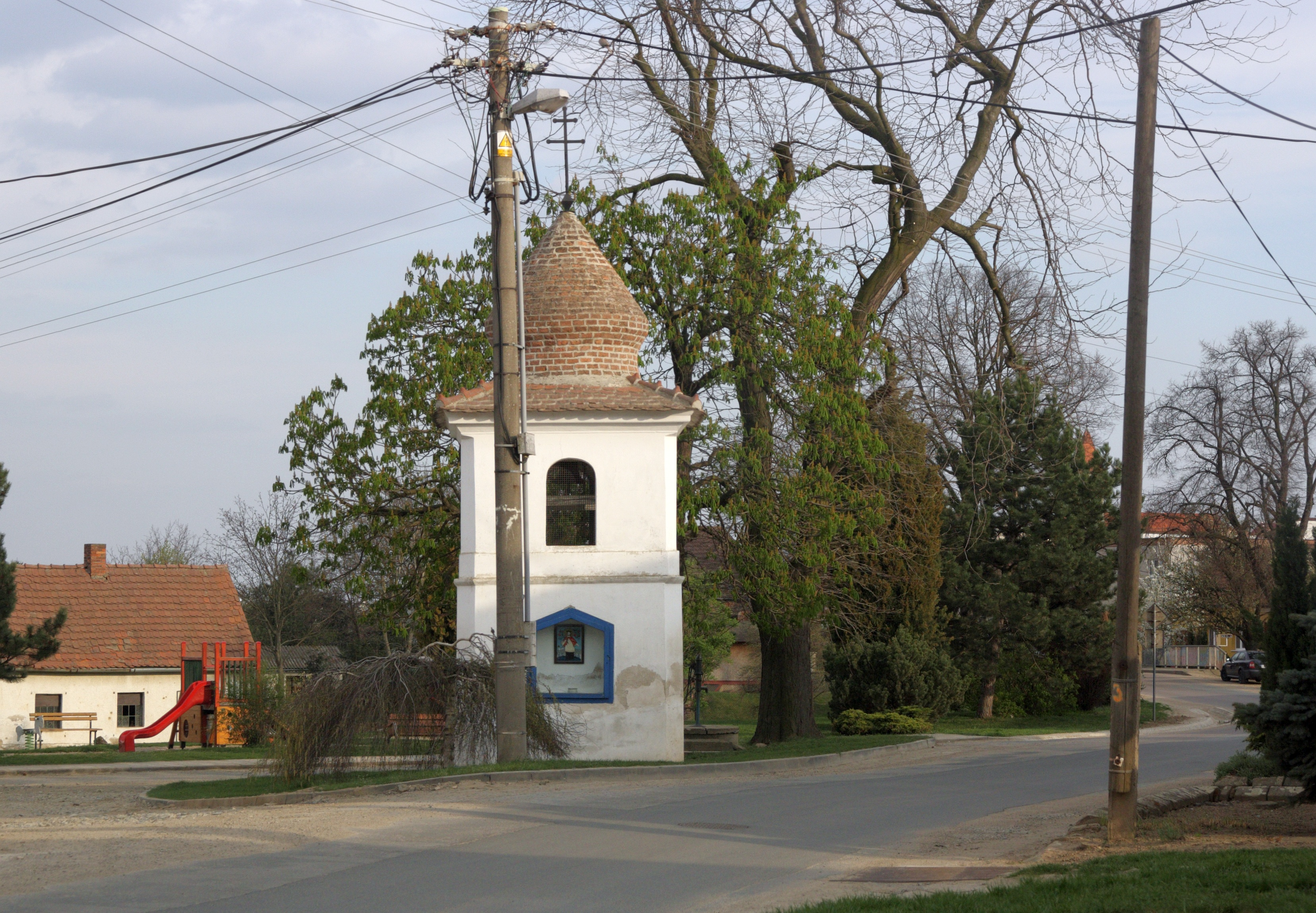 Jezeřany-Maršovice - zvonice v Maršovicích.